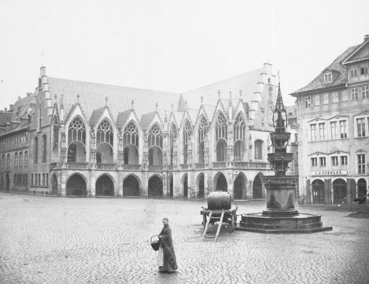 Ältestes bekanntes Foto des Altstadtrathauses mit Altstadtmarktbrunnen in Braunschweig, entstanden um 1865.